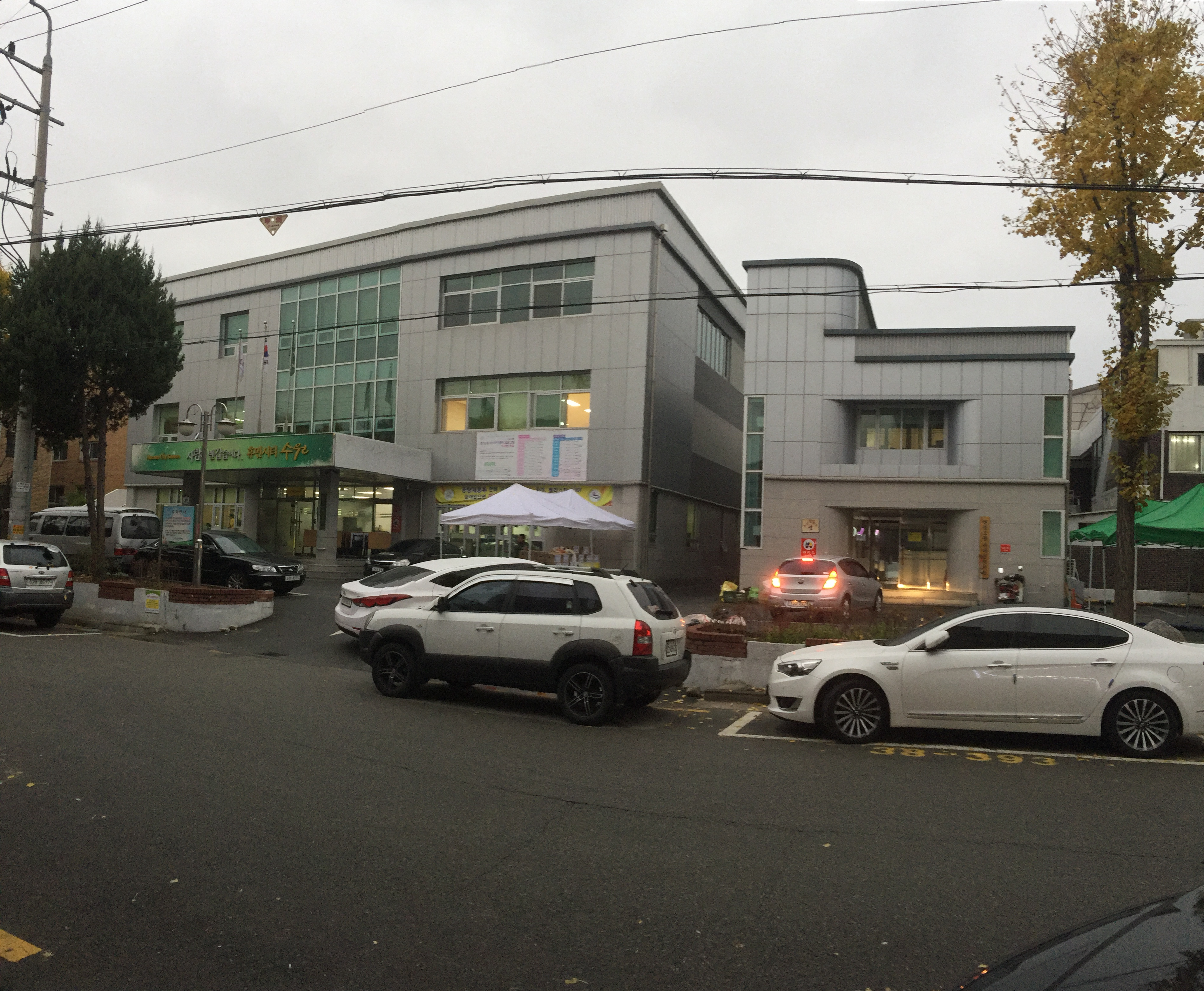 대한민국 경기도 수원시 권선구 권선1동 주민센터